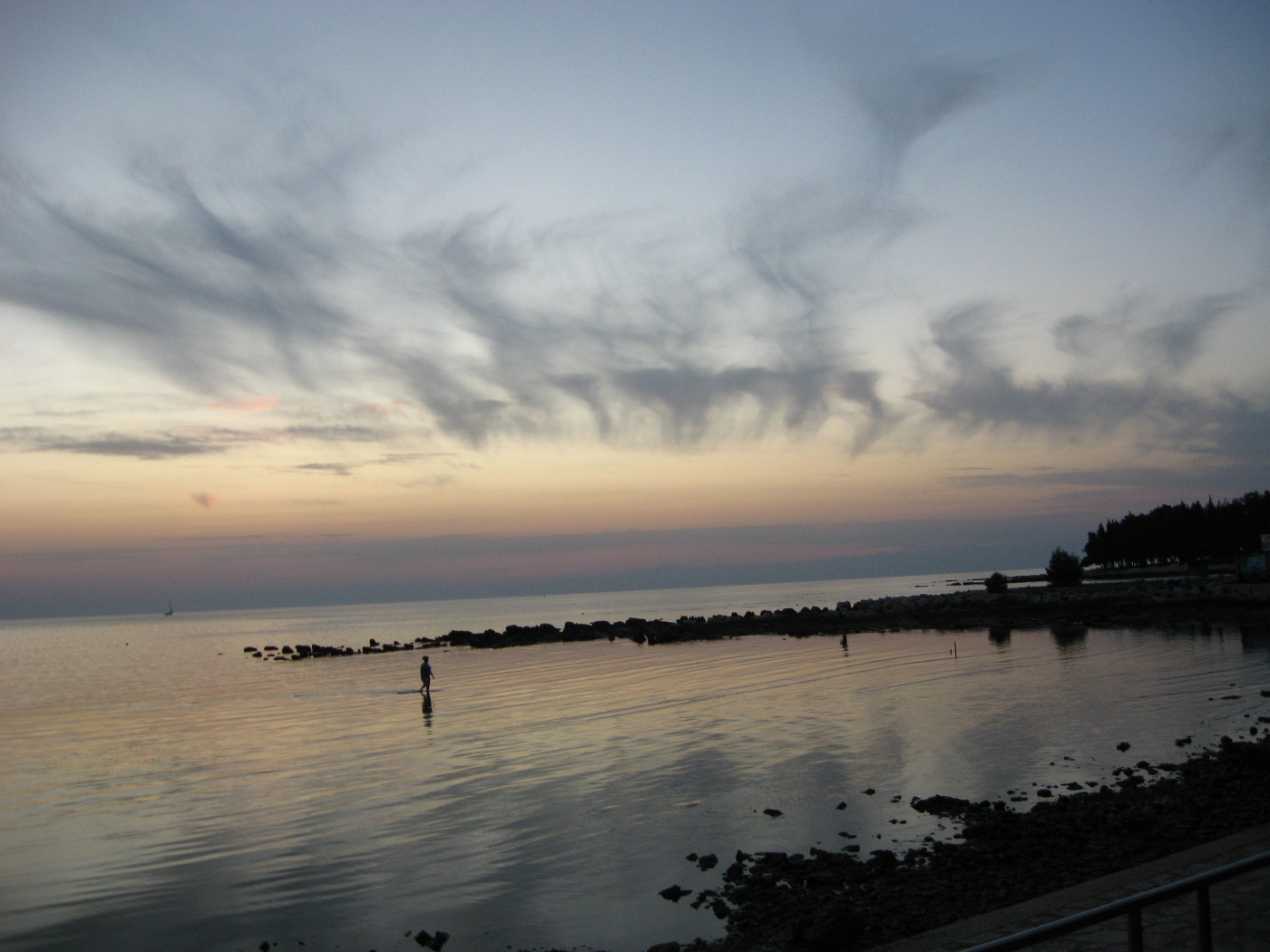 I remember - pamiętam.